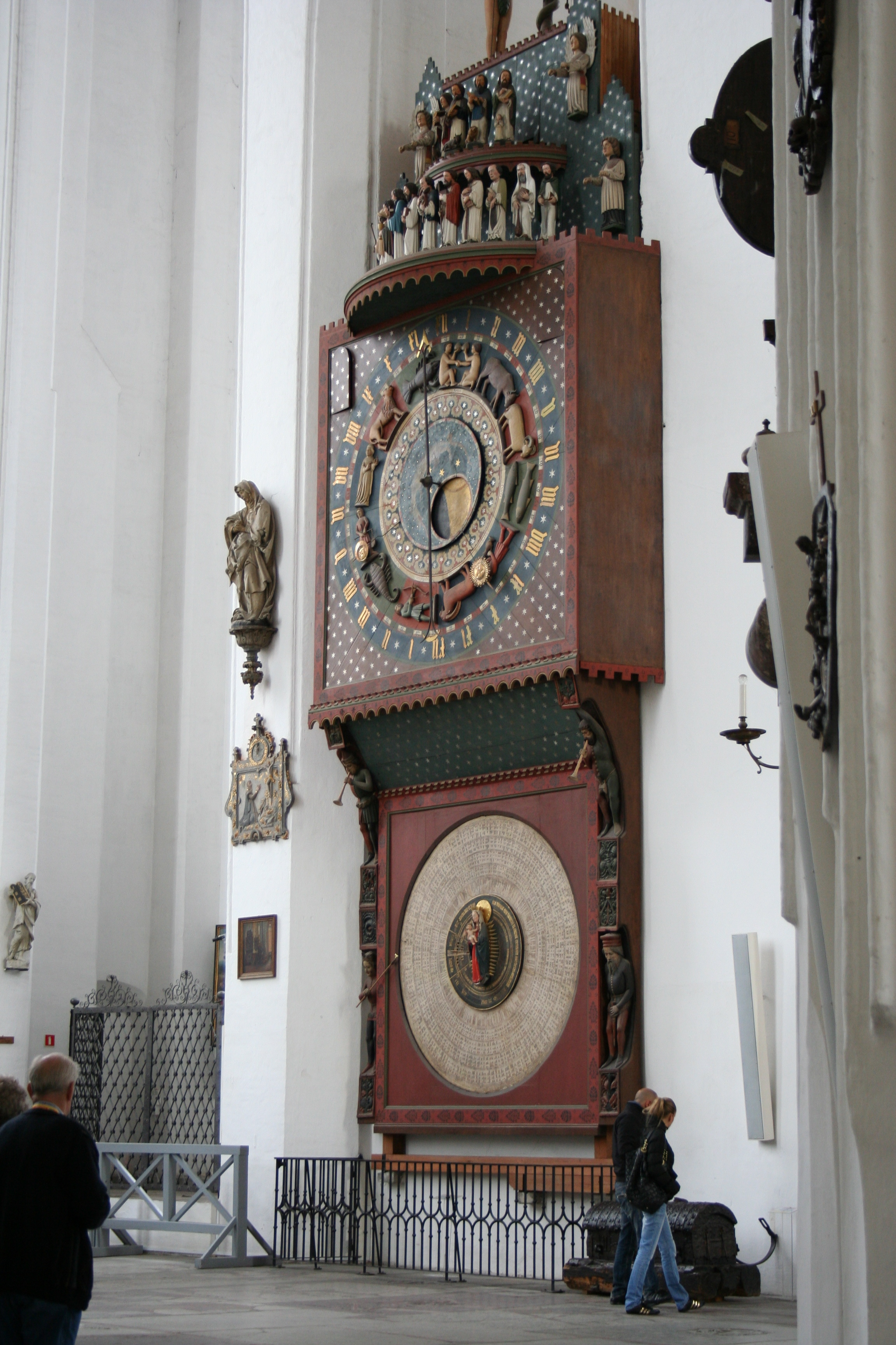 zespół kościoła parafialnego ob.rektorskiego p.w. Wniebowzięcia NMP kościół p.w. Wniebowzięcia NMP (Bazylika Mariacka)